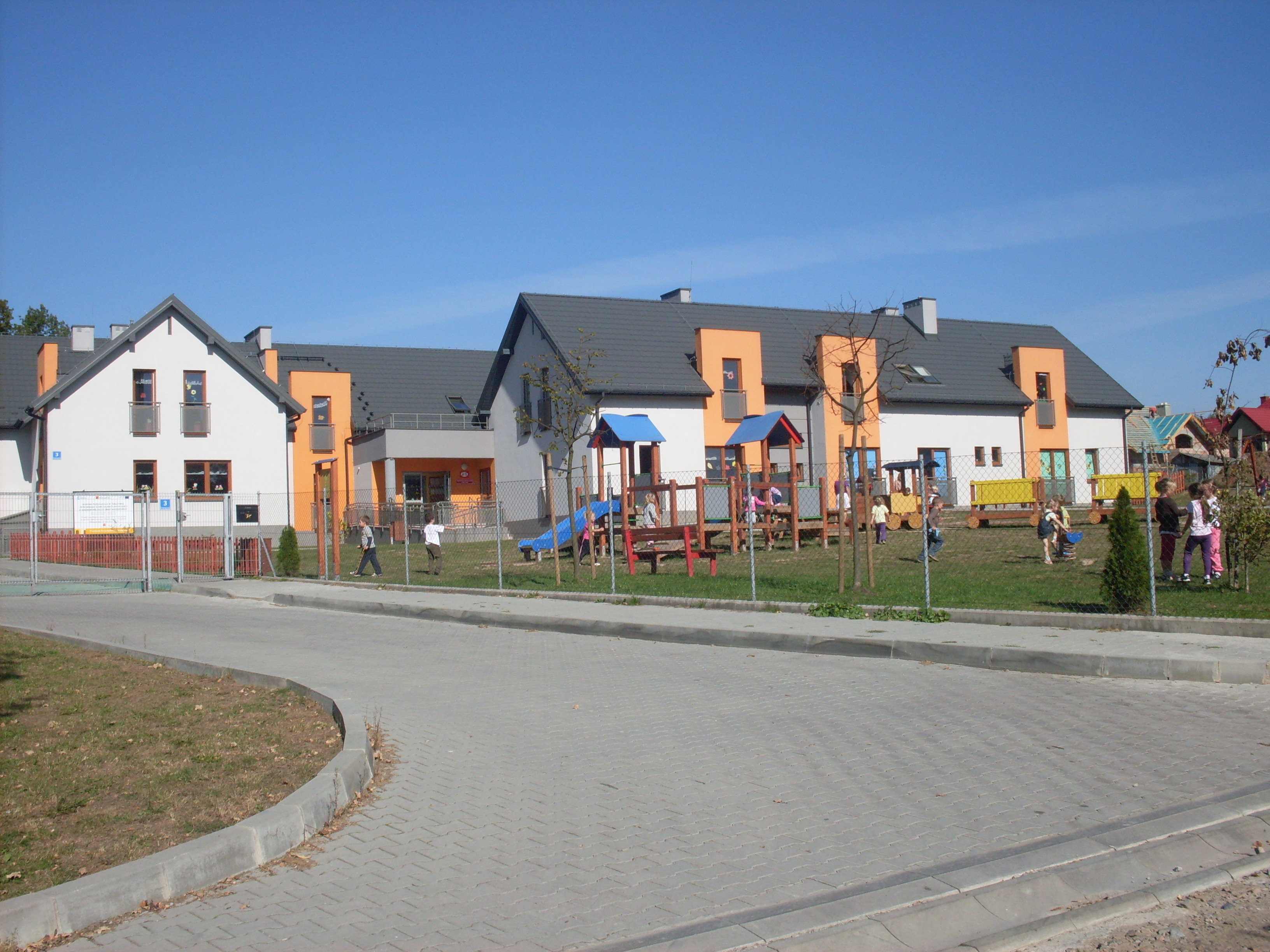 Tenczynek.Przedszkole